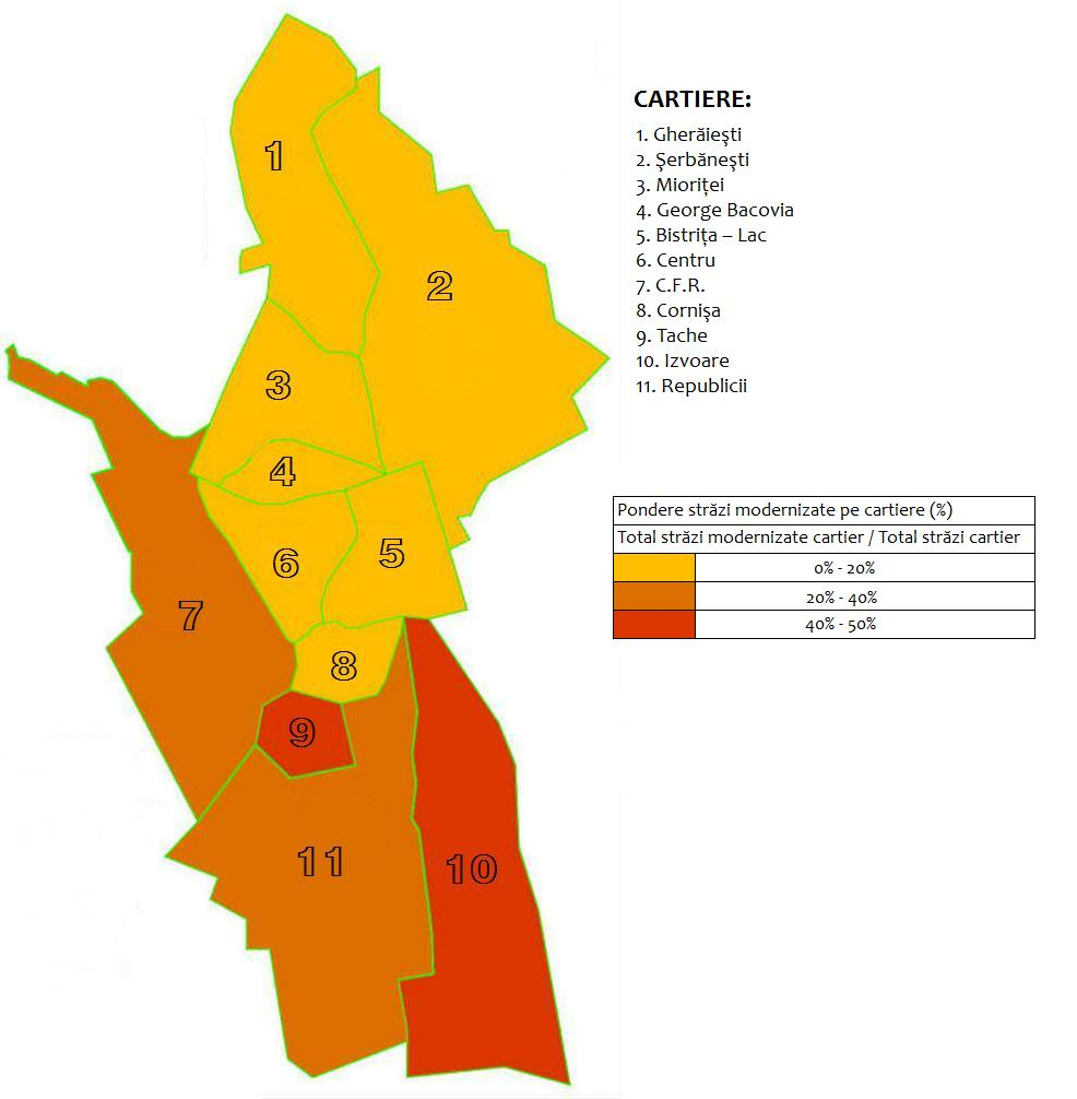 Cartierele orasului Bacau